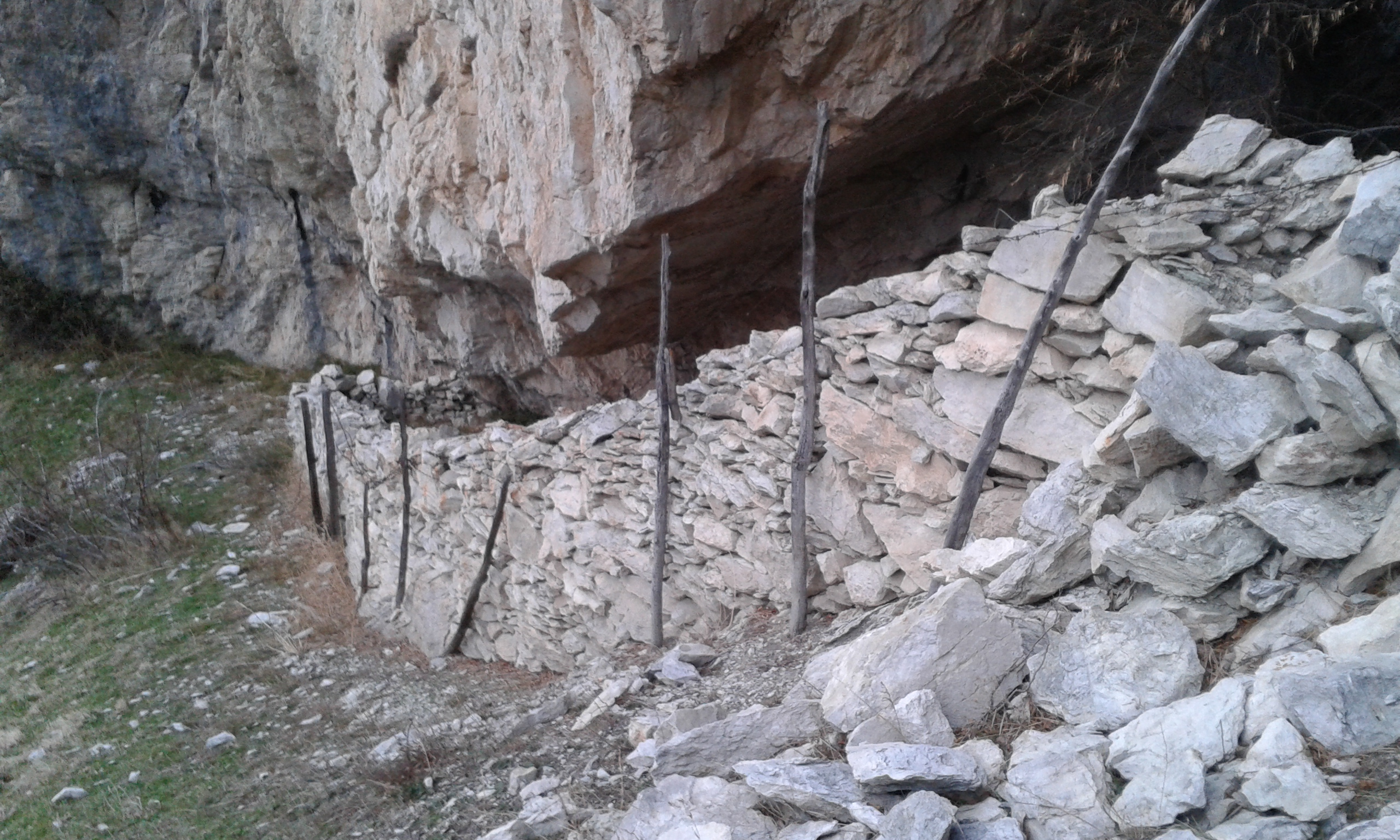 Resti di un ricovero per il bestiame ricavato in una grotta naturale dietro Balzo Rosso (Monte Amandola)